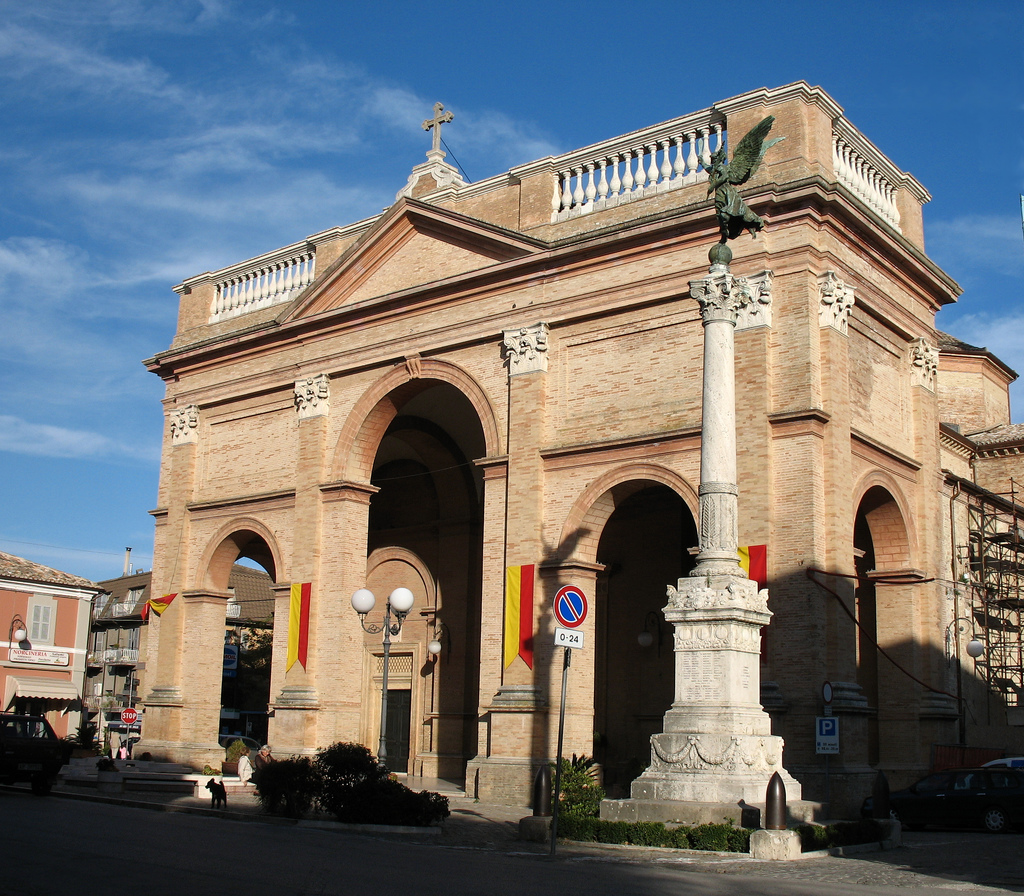 Cattedrale di Montalto delle Marche